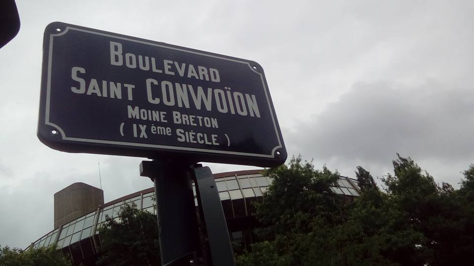 Plaque de la Rue Saint Conwoïon, Rennes